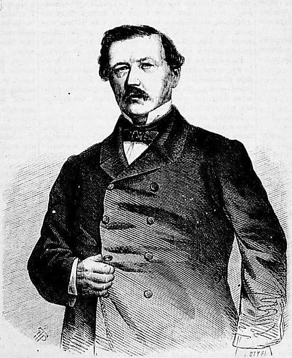 Gustaw Potworowski 1800-1860